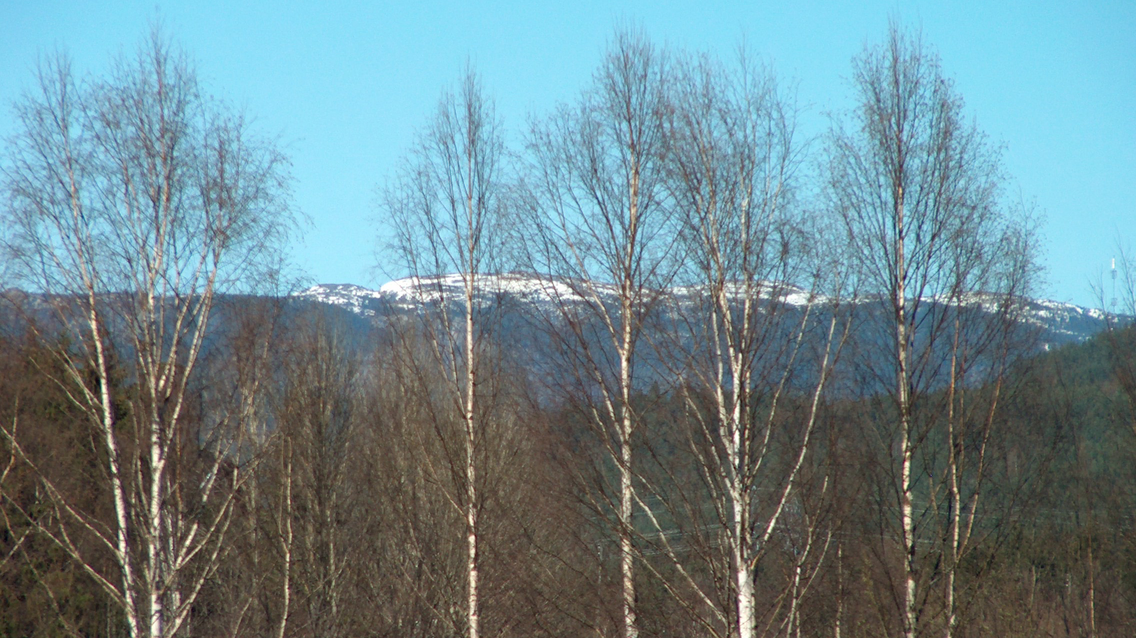 Utsyn mot Ådalsfjellene fra Soknedalen